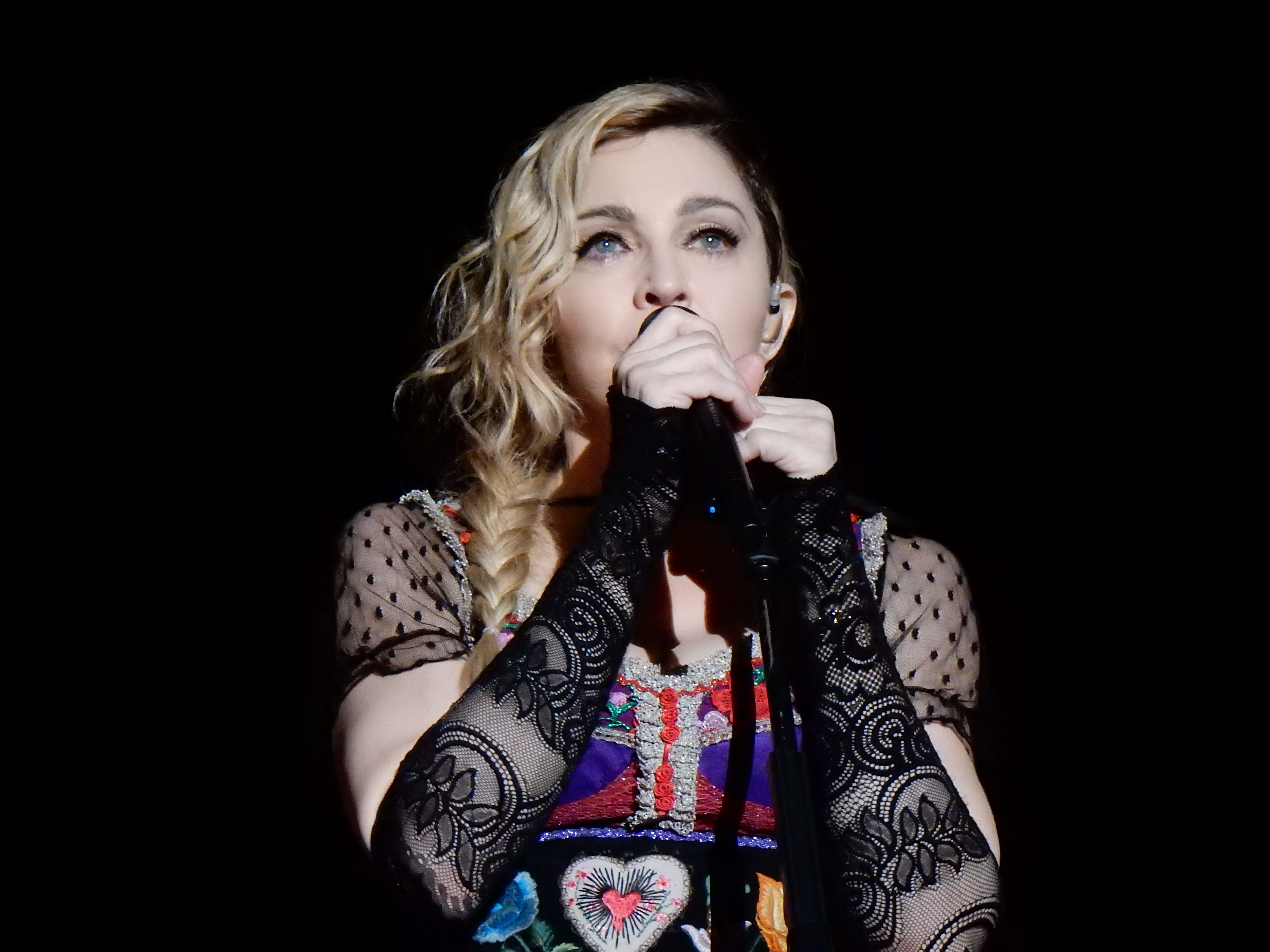 Madonna Rebel Heart Tour 2015 - Stockholm